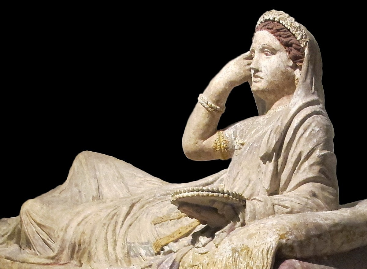 Sarcofago di Larthia Seianti - Dettaglio